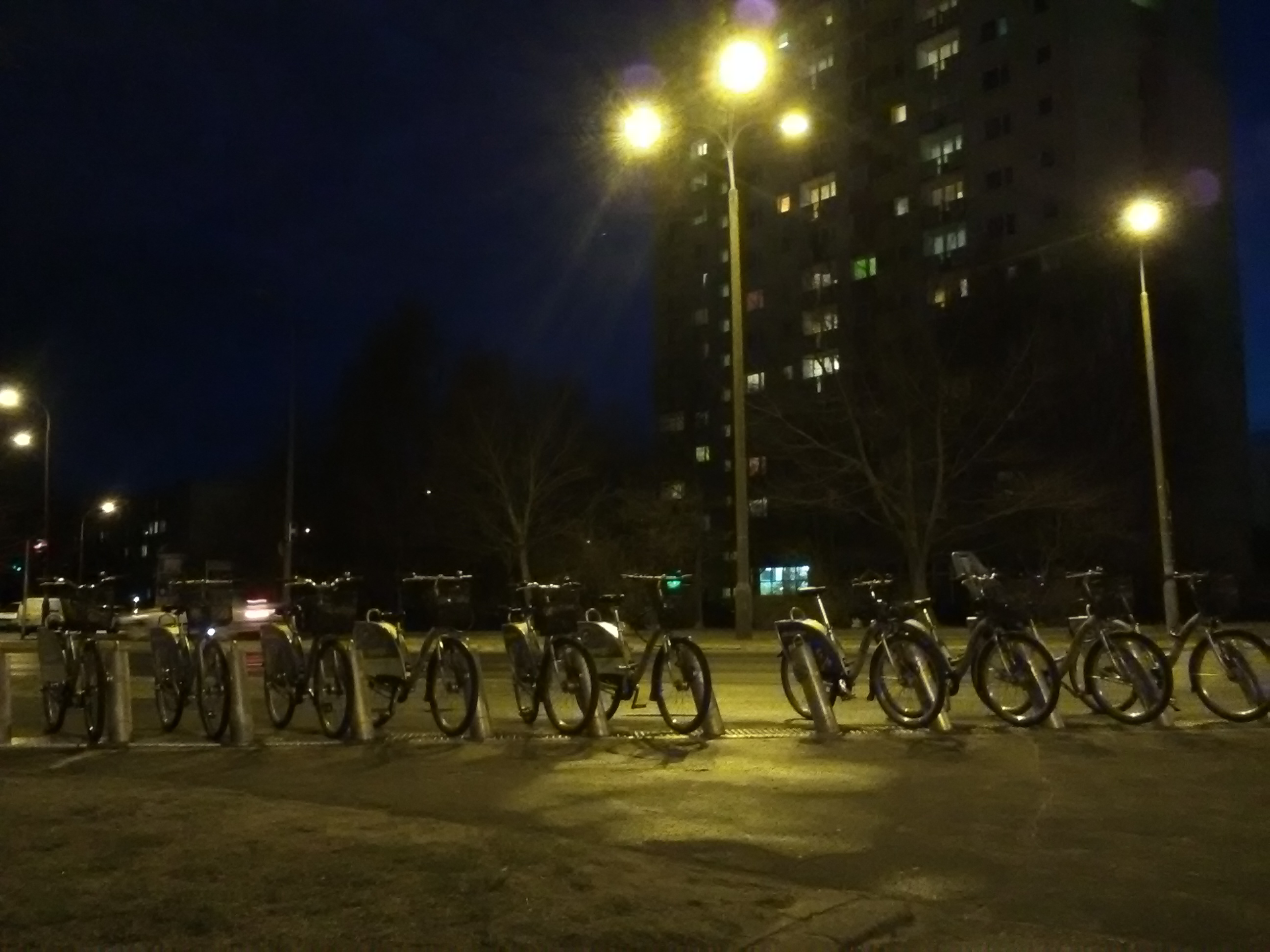 Ulica Piłsudskiego w Poznaniu.